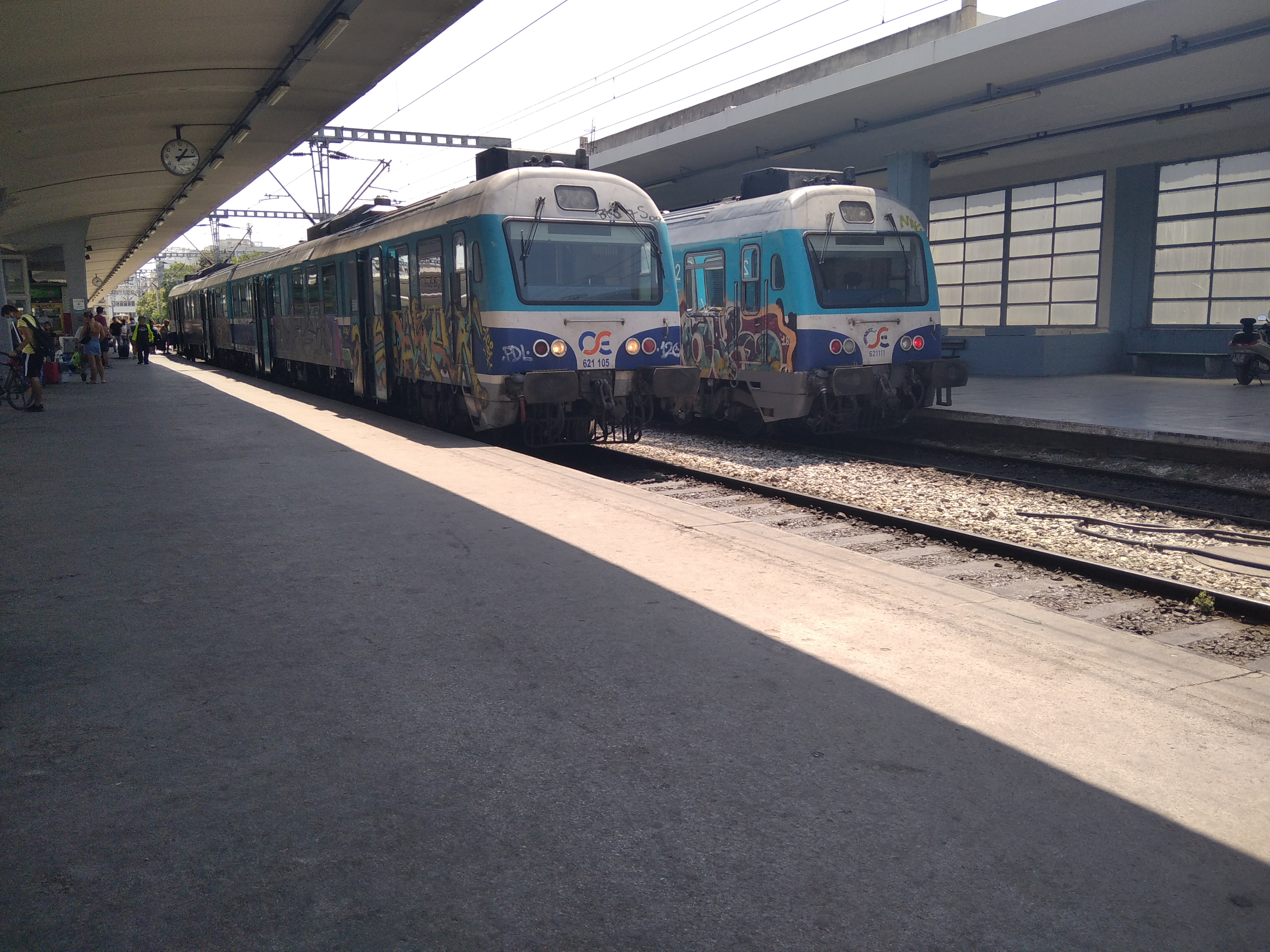 ΜΑΝ2000 15-8-2020 Θεσσαλονίκη-Φλώρινα